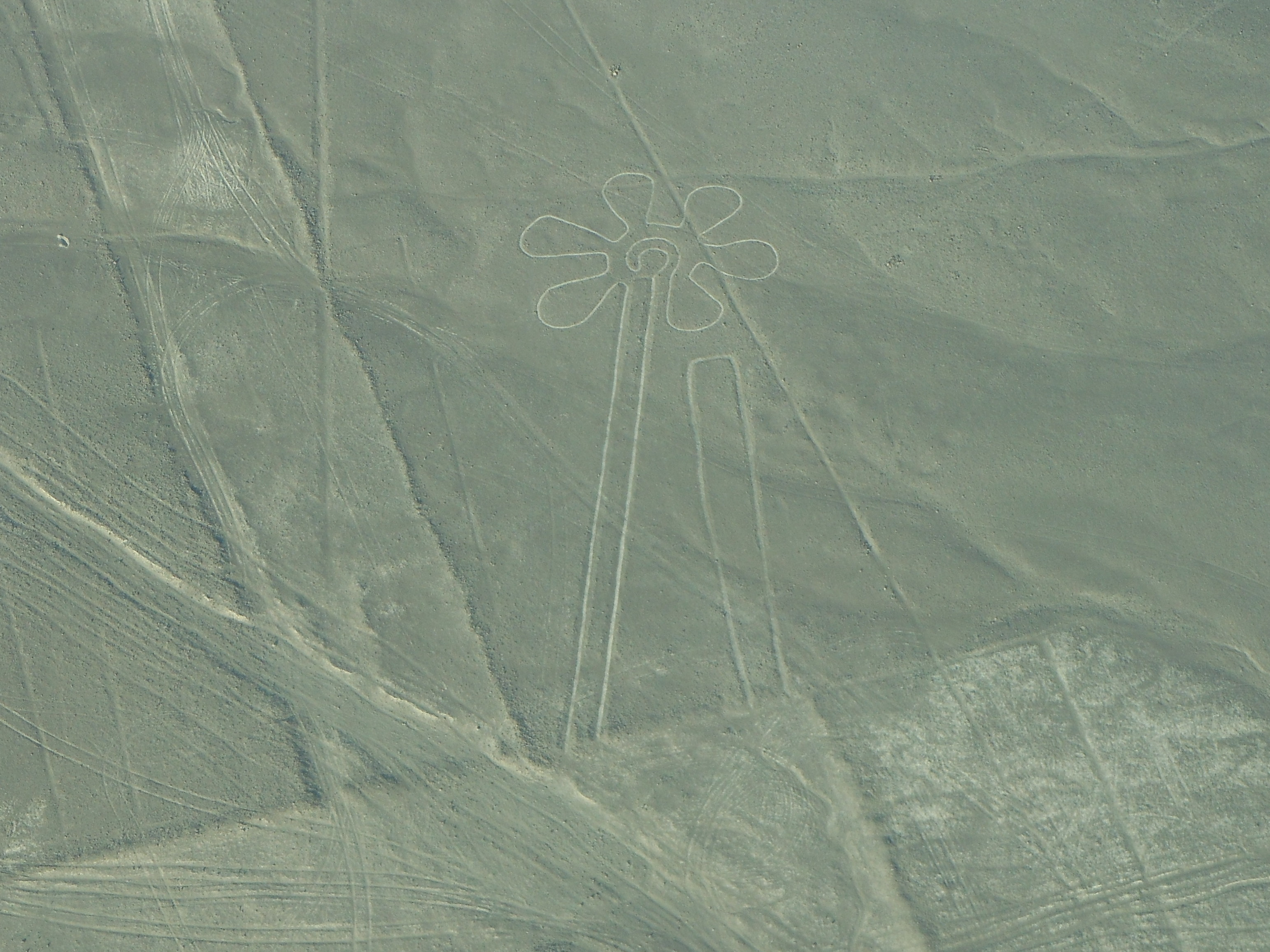 Linee di Nasca fiore, Nazca. Fotografato da un volo turistico nel luglio 2019